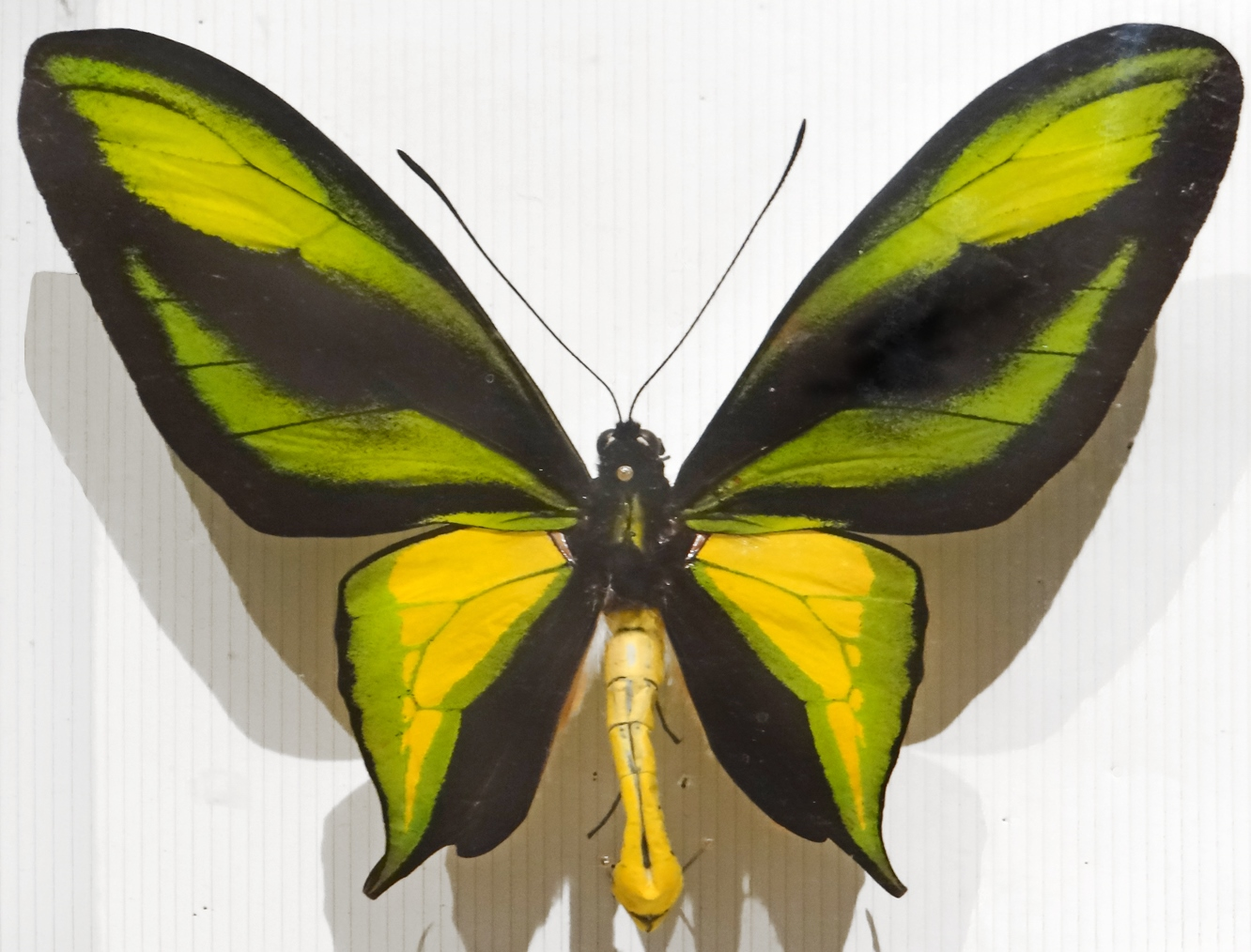 Ornithoptère paradisea arfakensis (mâle) Nouvelle-Guinée Museum d'histoire naturelle de Nantes article de Wikipedia sur le papillon La collection de Zoologie comprend plus de 1 600 000 spécimens regroupés en différents domaines, dont les plus importants sont les collections d'oiseaux, d'insectes et de coquillages. extrait du site officiel Site du Museum d'histoire naturelle de Nantes